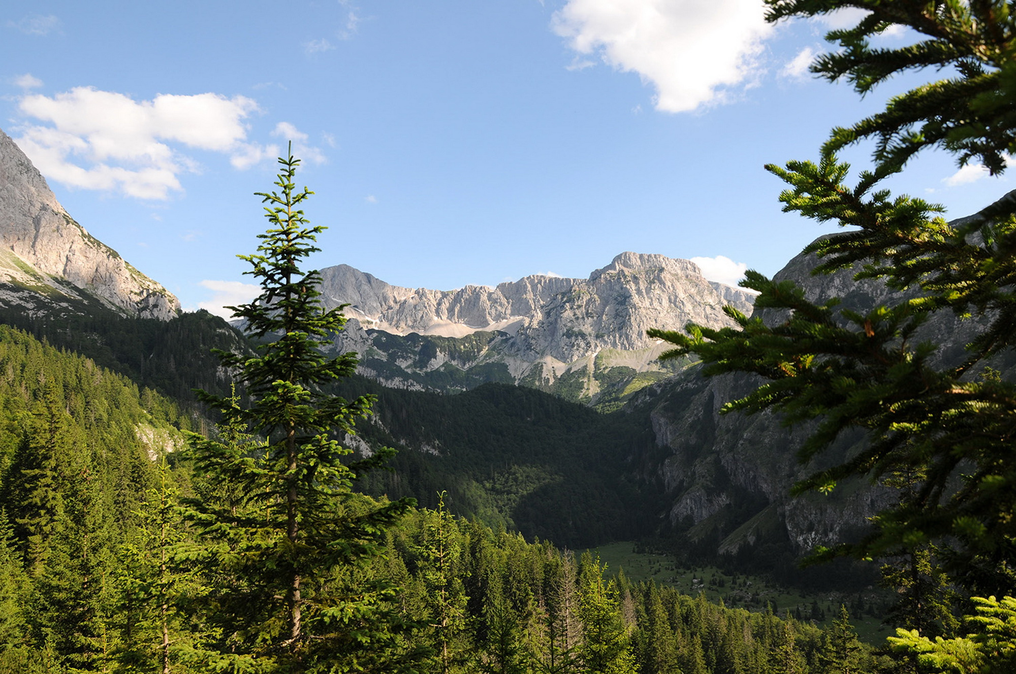 NP Sutjeska This image was uploaded as part of Trace of Soul 2015.